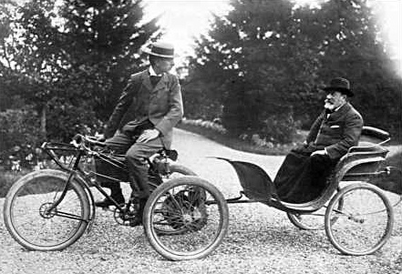 Ilustraciones libro de Memorias Saint-Saëns, 1919